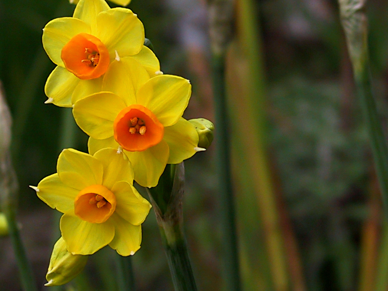 Narcissus